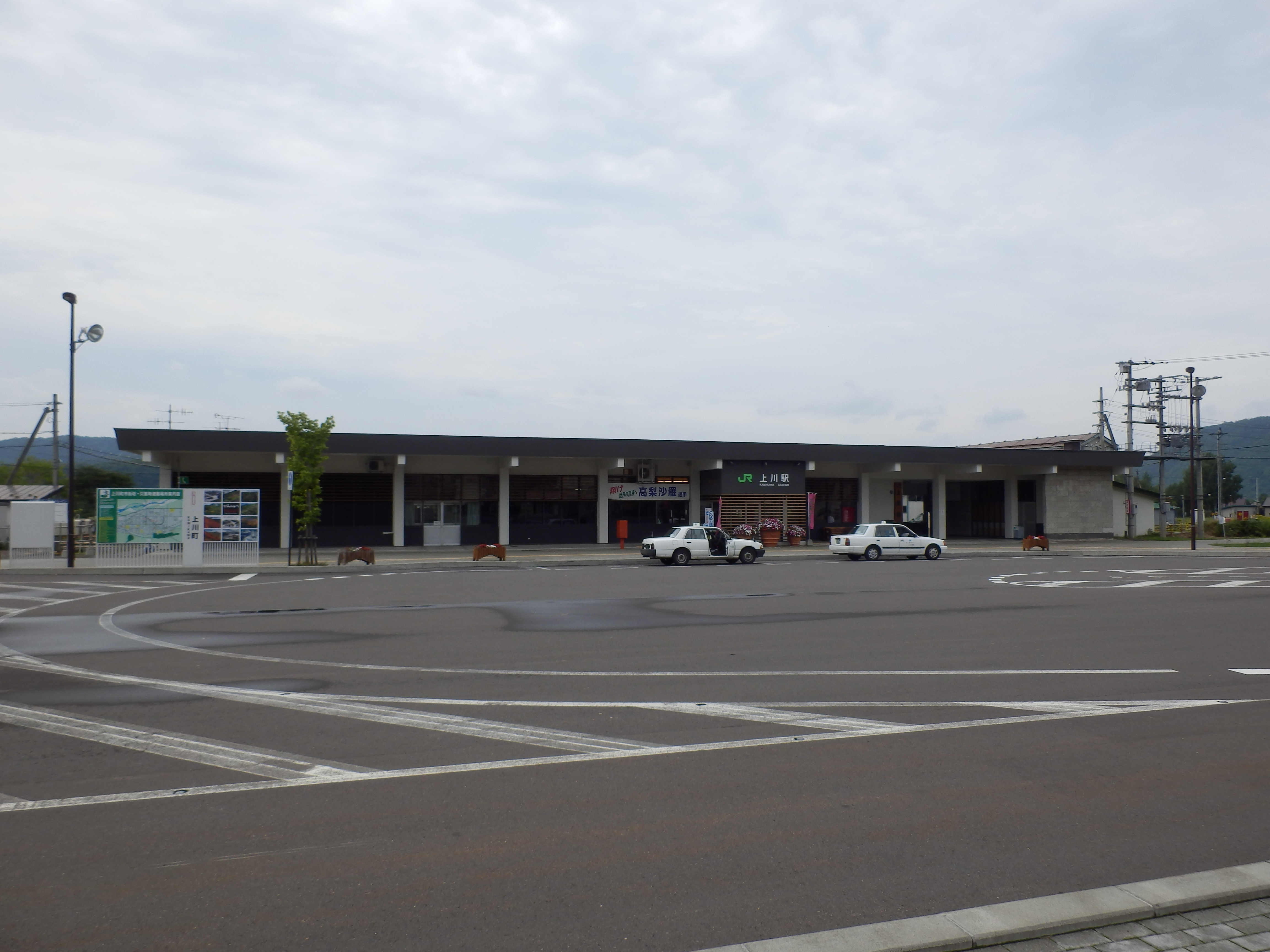 駅舎全景とロータリー